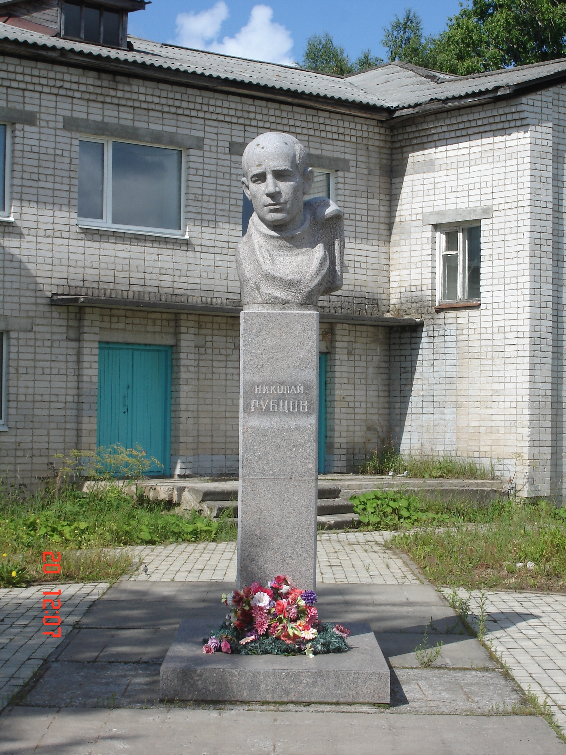 Памятник РУбцову в Емецке